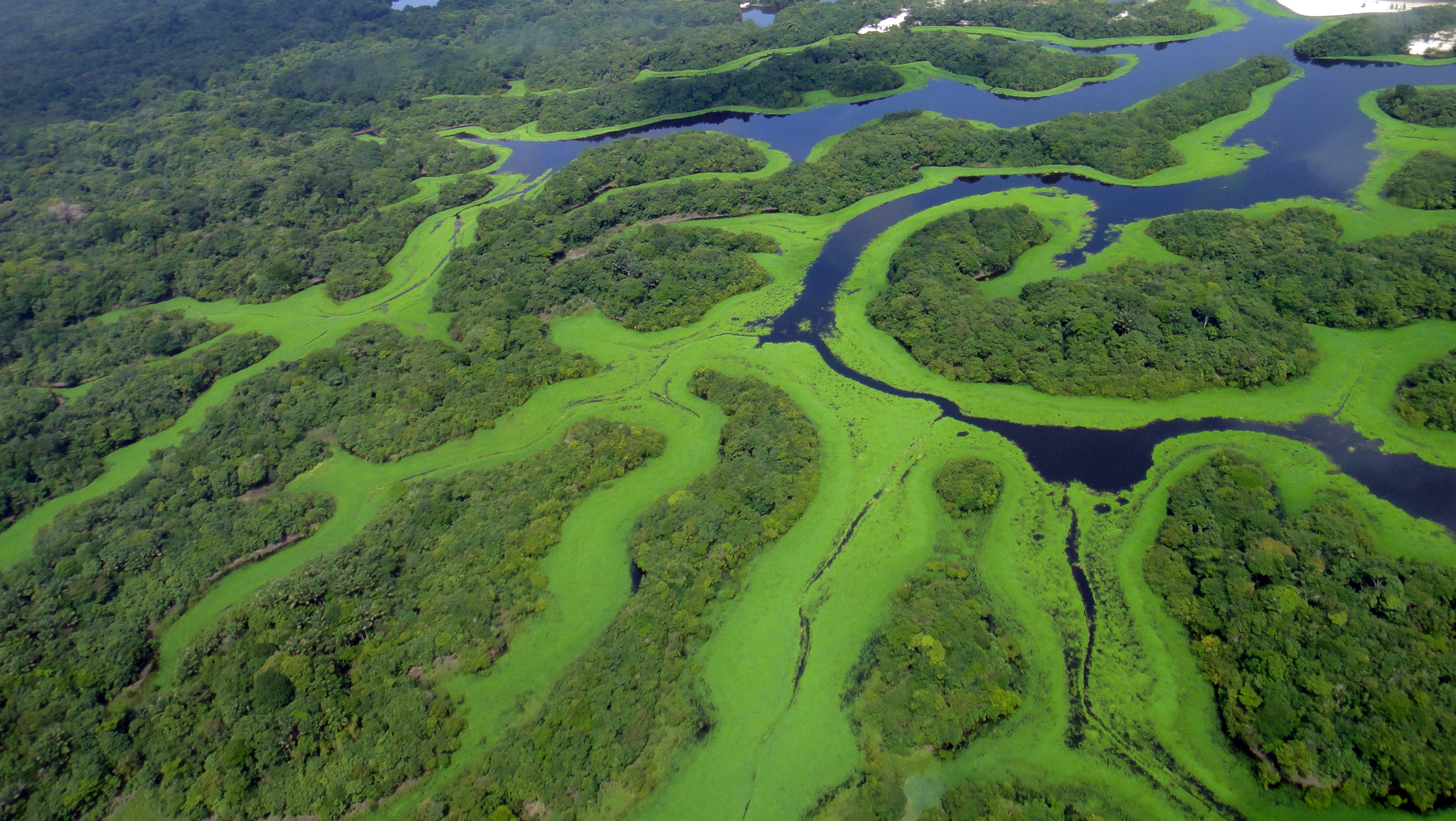 Curvas do Parque Nacional de Anavilhanas